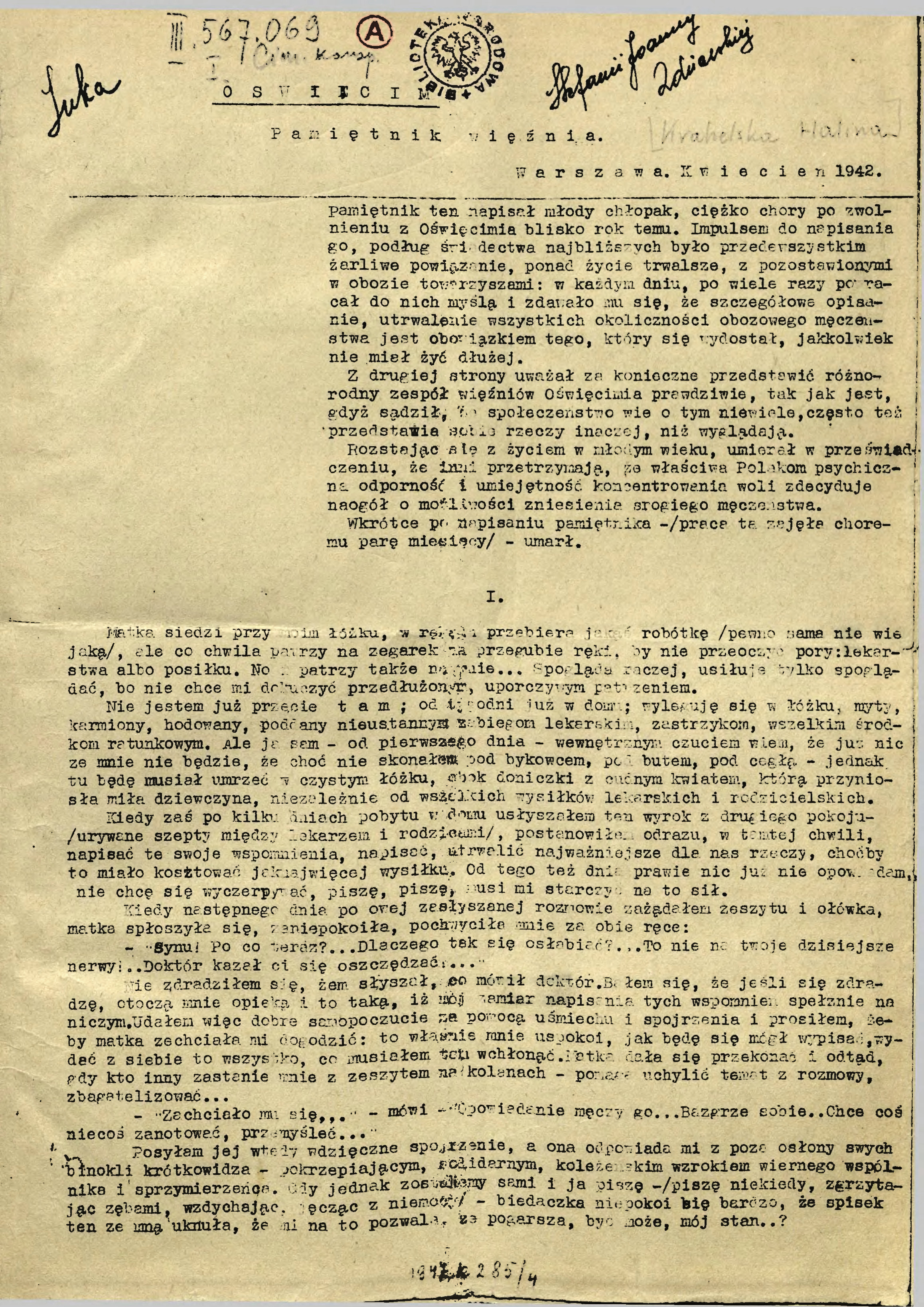 Halina Krahelska "Pamiętnik więźnia".